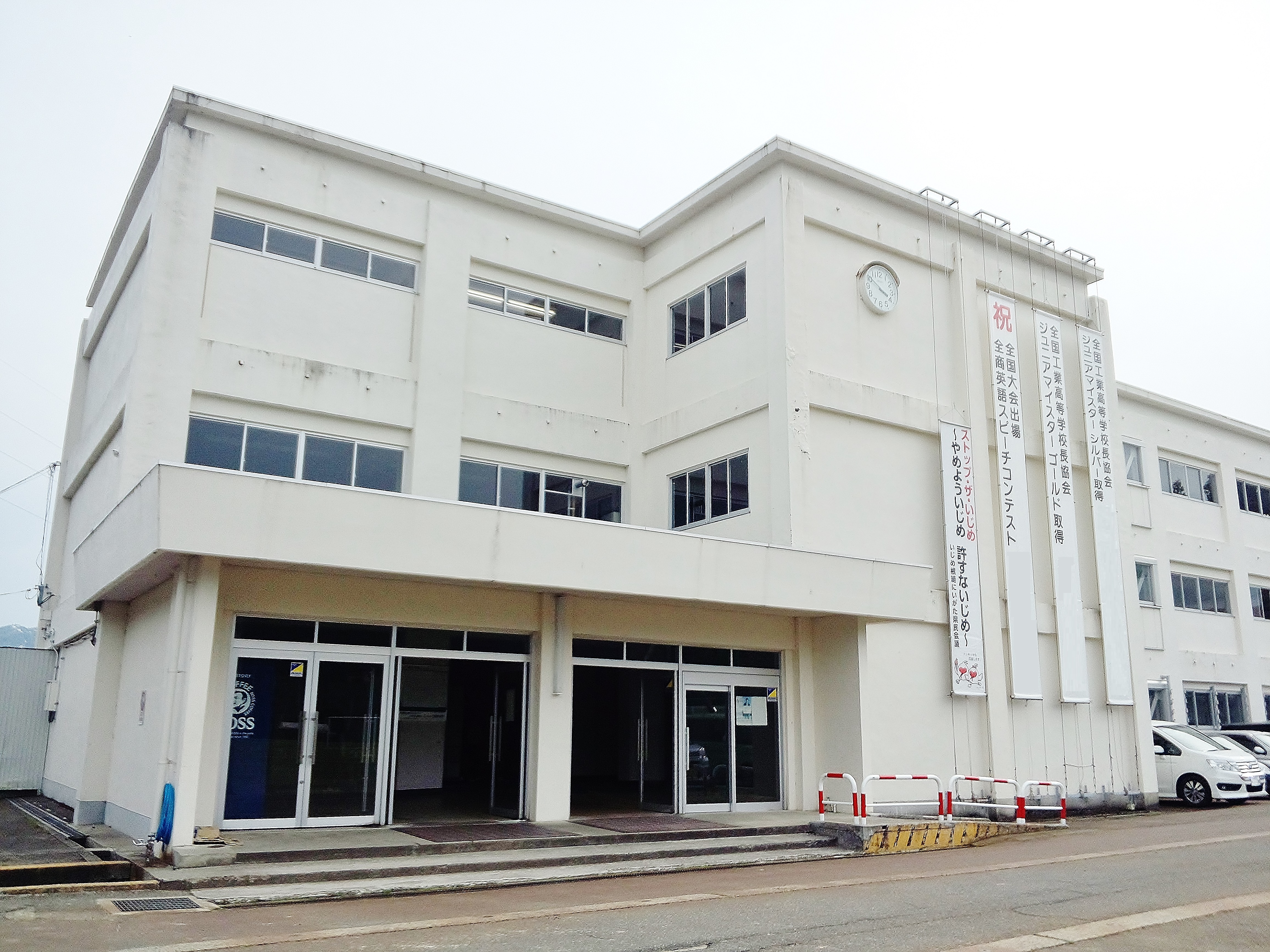 塩沢商工高等学校 校舎(生徒玄関)